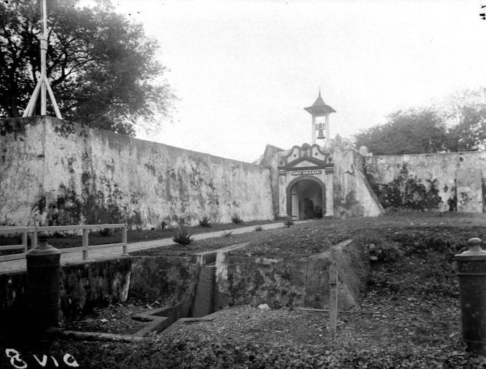 Negatief. Fort "Oranje" op Ternate